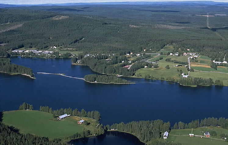 Nära Bellsås Motiv: Hotingsjön Nyckelord: Flygbilder, Riksintressen Kategori: Insjömiljöer Nära Bellsås.